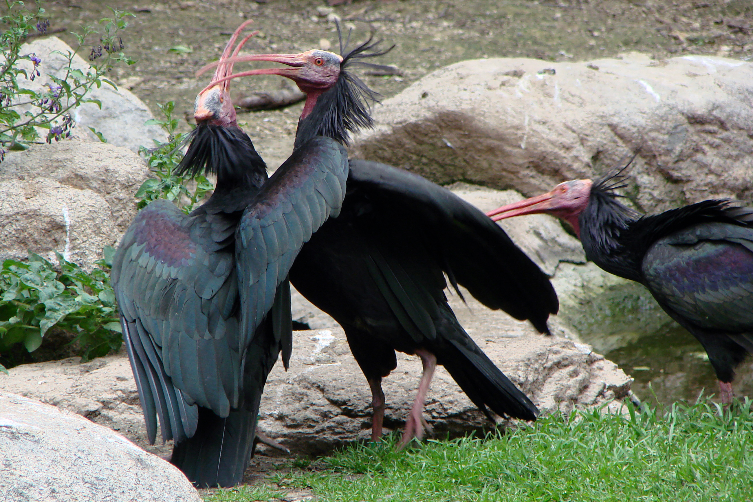 Ibis chauves (Geronticus eremita) au zoo de Doué-la-Fontaine.